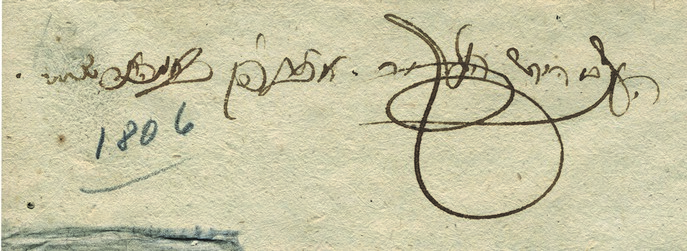 חתימת ידו של הגאון הנודע רבי צבי הירש העליר (תקל"ו-תקצ"ה, אנצי' לחכמי גליציה, ב' 665-671). חתימת רבי צבי הירש העליר אב"ד בוניהאד, רבם של רבי שלמה גנצפריד ורבי הירש מליסקא